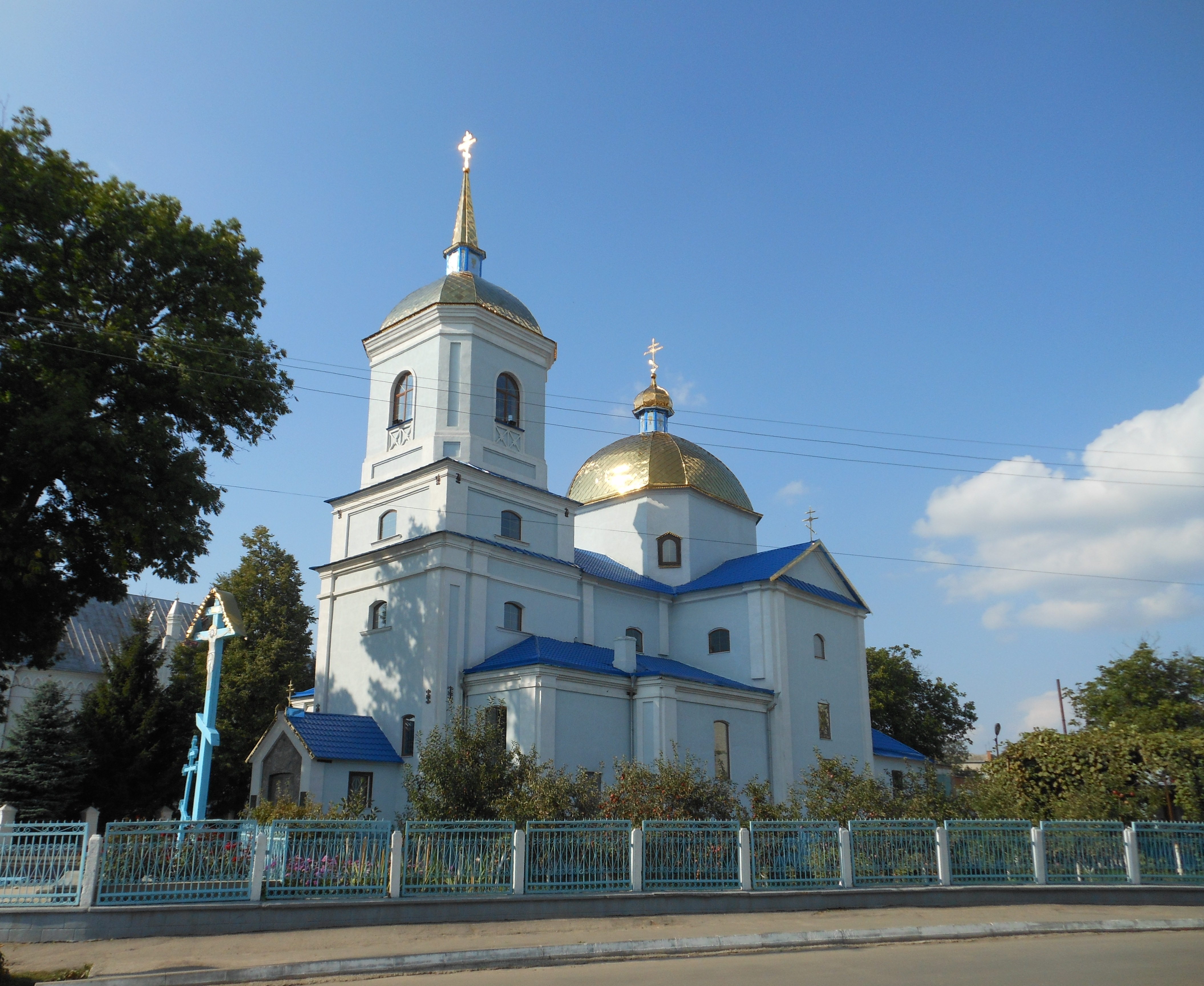 Успенська церква, Бар, вул. св.Миколая,10/22